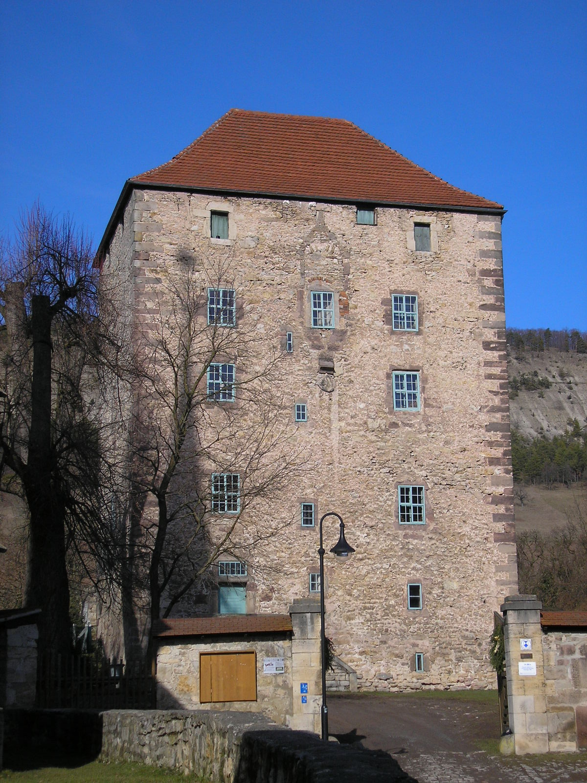 Die Kemenate in Reinstädt bei Kahla (Thüringen).